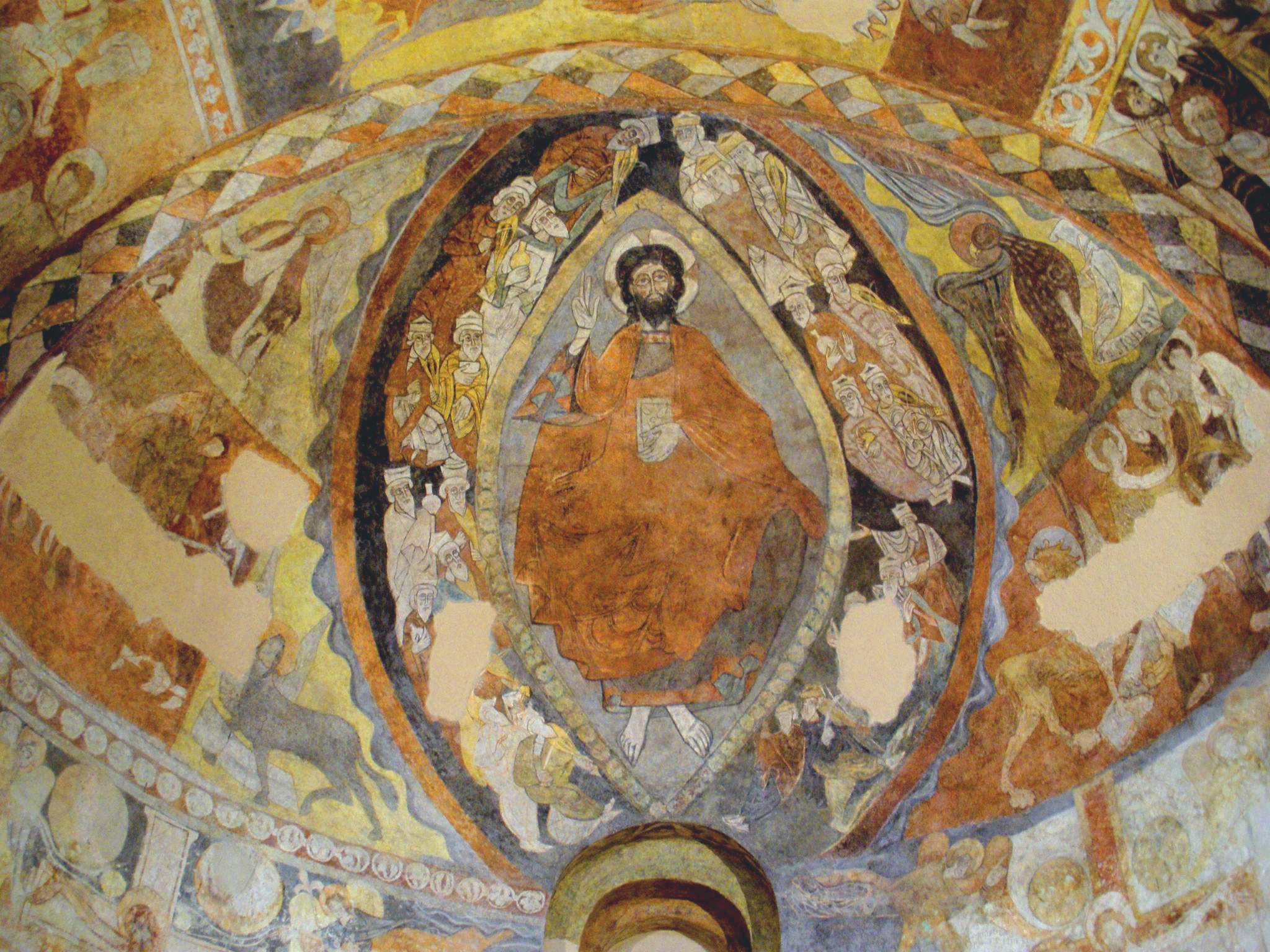 Iglesia de San Justo, Segovia Romanesque apse fresco of Christ in Majesty